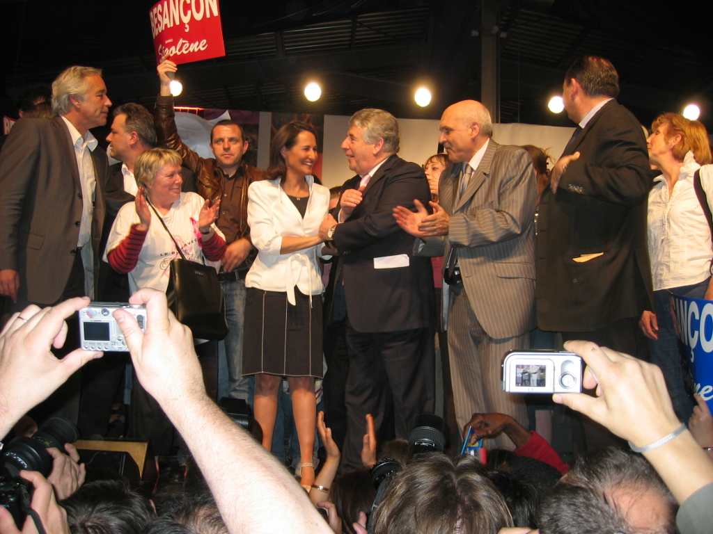 Jean-Louis Fousseret (maire de Besancon) tenant la main de Ségolène Royal à la fin du meeting des présidentielles 2007 de Ségolène Royal du Jeudi 12 Avril à Besancon (et François Rebsamen, maire socialiste de Dijon à gauche de la photo, et co-directeur de campagne presidentielle de Ségolène Royal , avec Jean-Louis Bianco).On peut voir aussi Claude Jeannerot Président du Conseil Général de Doubs (en complet gris à rayure, à droite de Jean Louis Fousseret) Depicted people: Jean-Louis Fousseret, Ségolène Royal, François Rebsamen and Claude Jeannerot